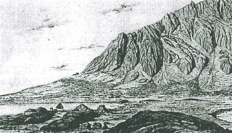 Herjolfsnes/Ikigait/Ostproven dans les années 1850.